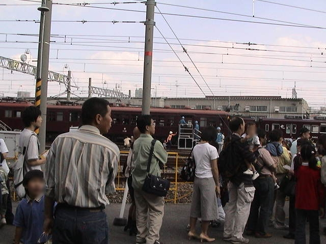 Hankyu Railway festival in Hankyu Syoujaku Factory,Osaka,Japan.